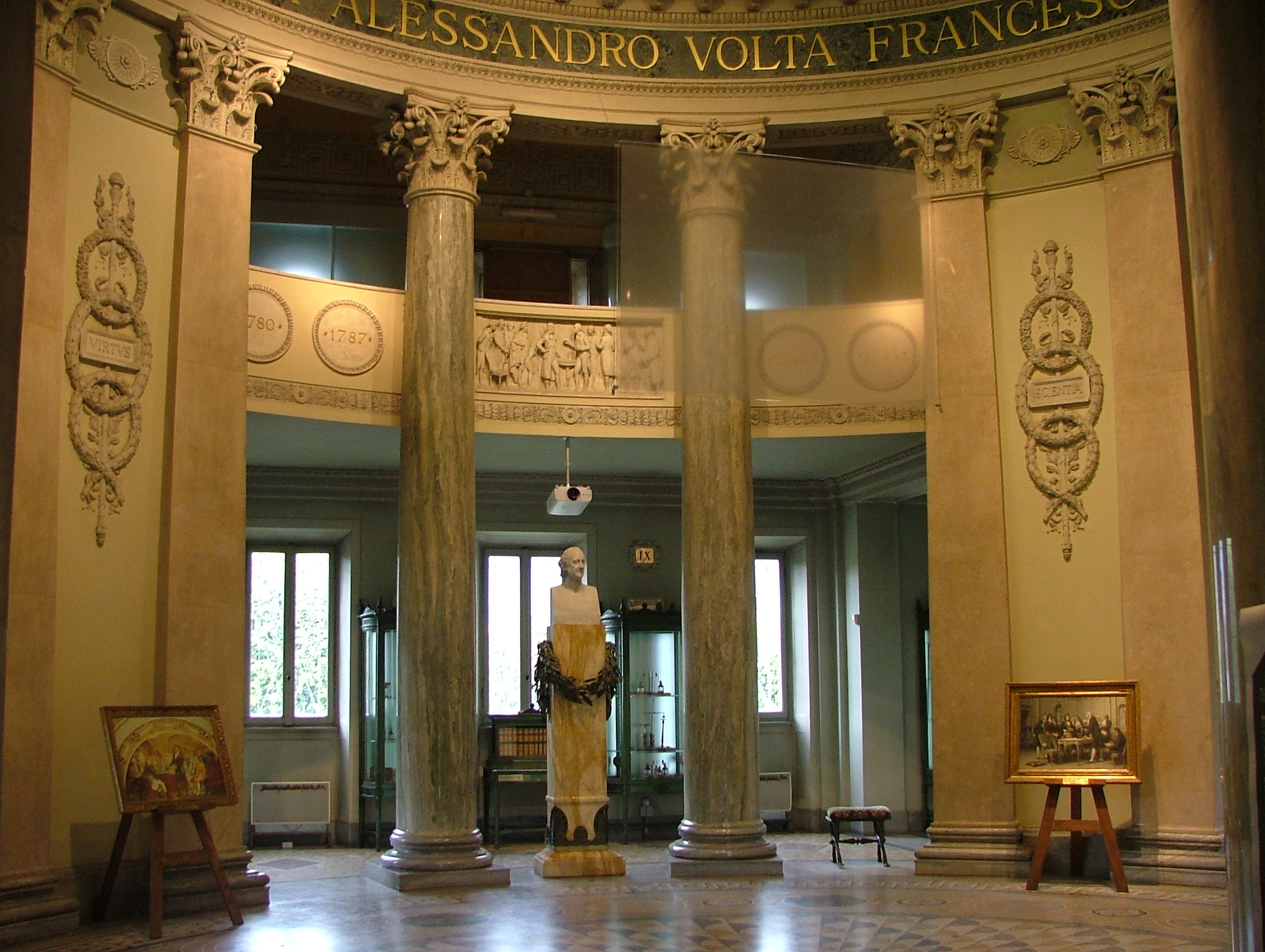 Volta Monument Como